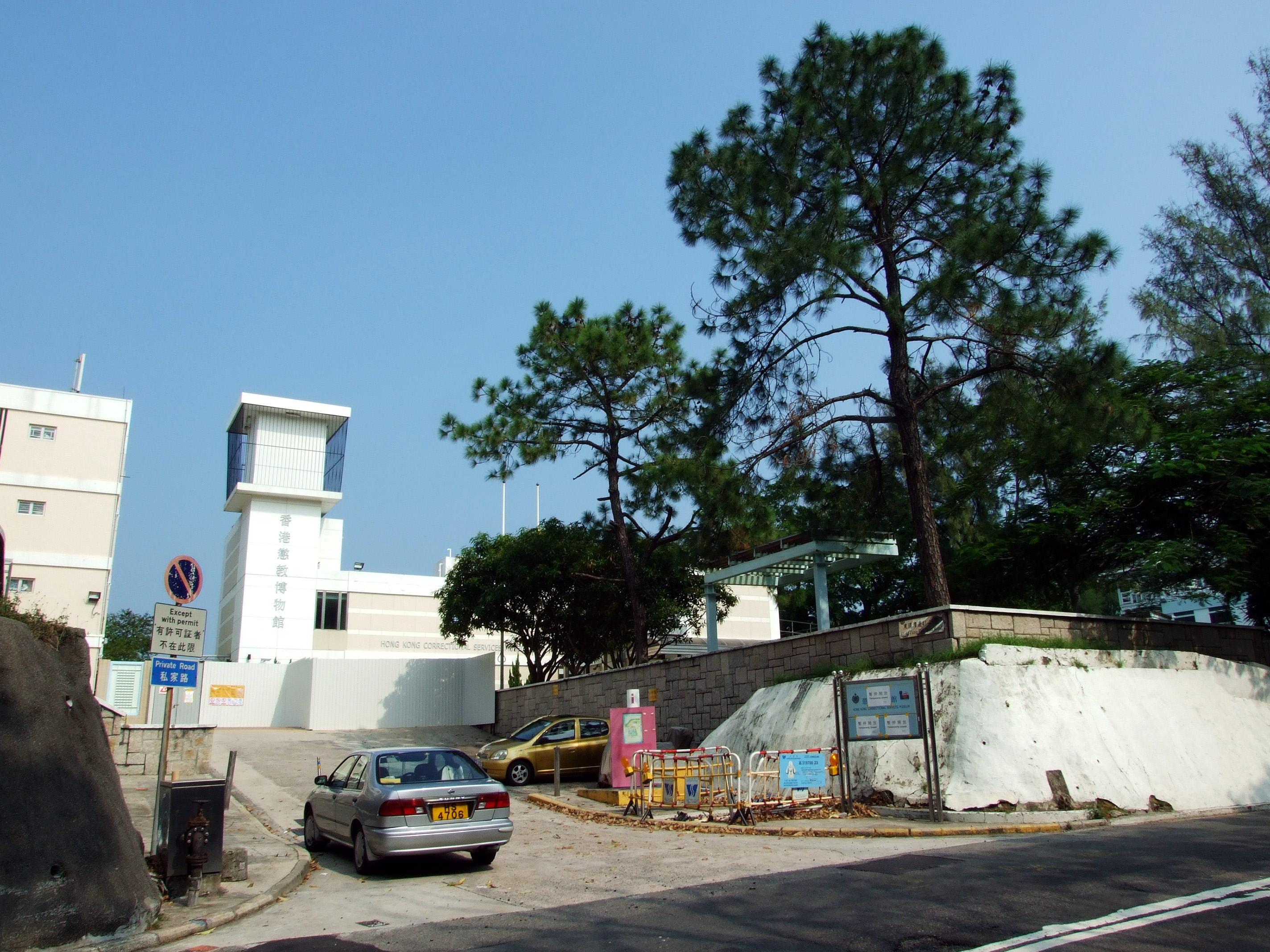 中文（香港）: 香港懲教博物館